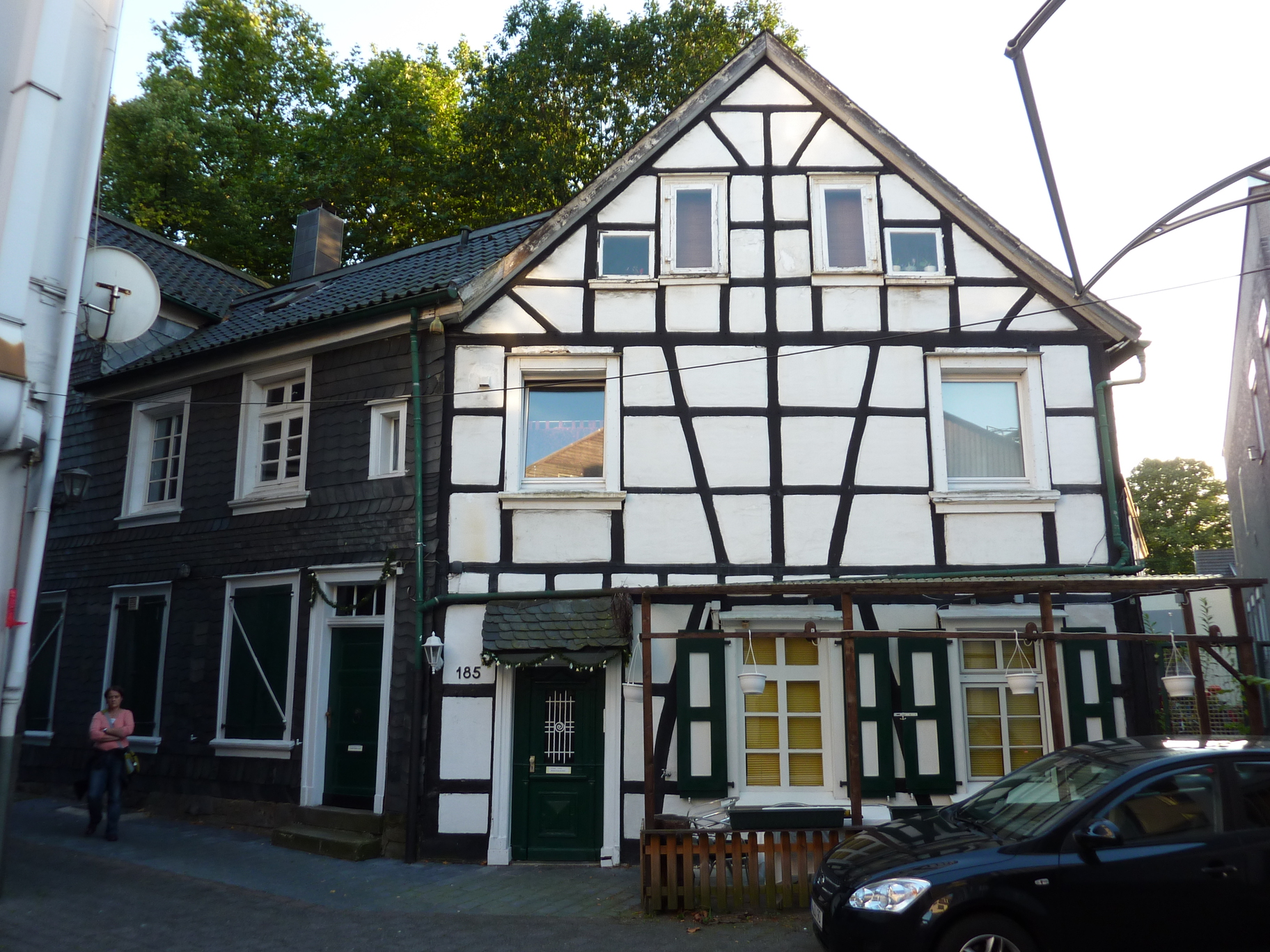 Wohn- und Geschäftshaus Friedrich-Engels-Allee 185, WuppertalThis is a photograph of an architectural monument. 1280